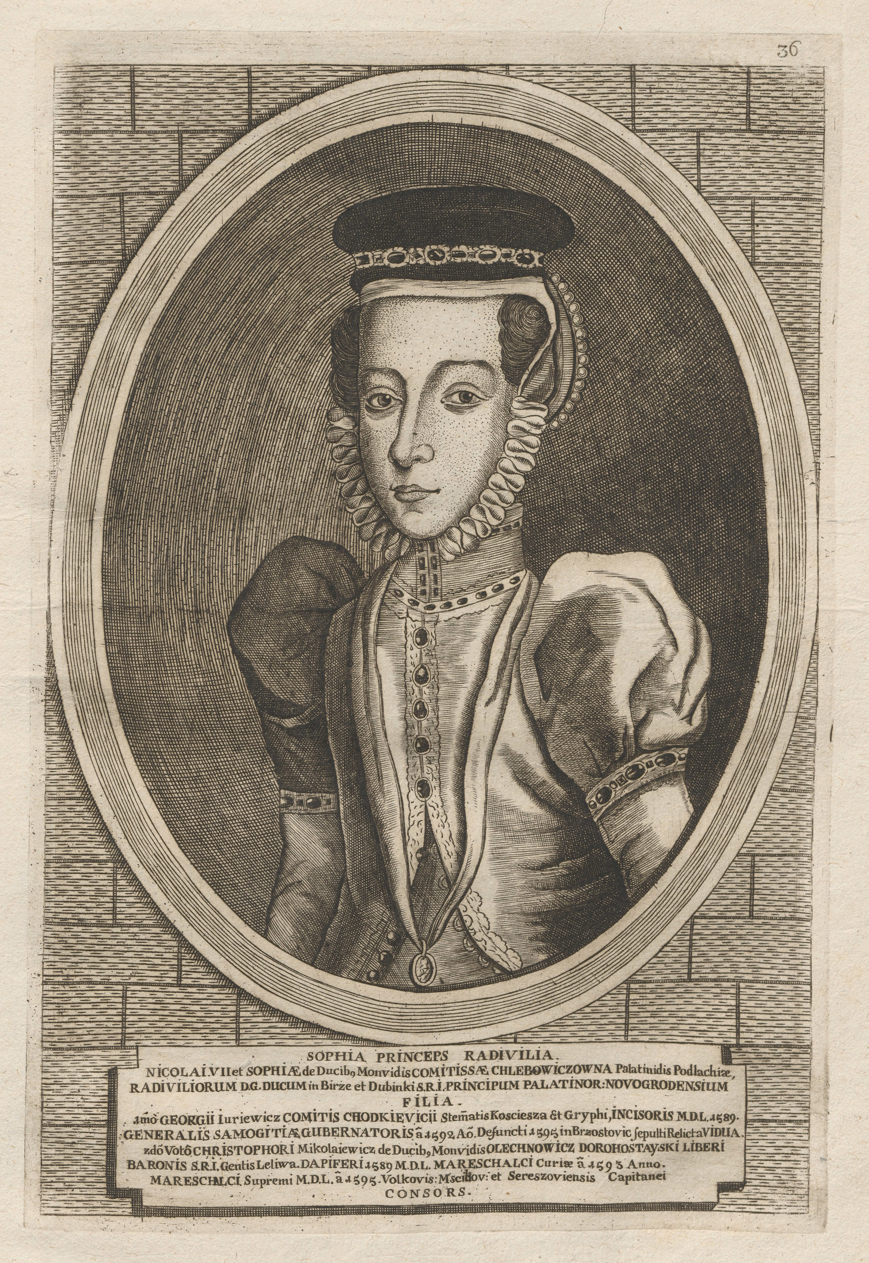 Соф'я з РадзівілаўБеларуская (тарашкевіца): Партрэт Соф'і Хадкевіч-Дарагастайскай (Sofja Chadkievič-Darahastajskaja) з роду Радзівілаў (Radzivił)